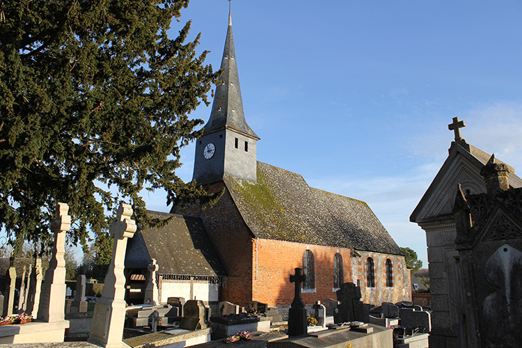 Saint-Symphorien (Eure) église paroissiale